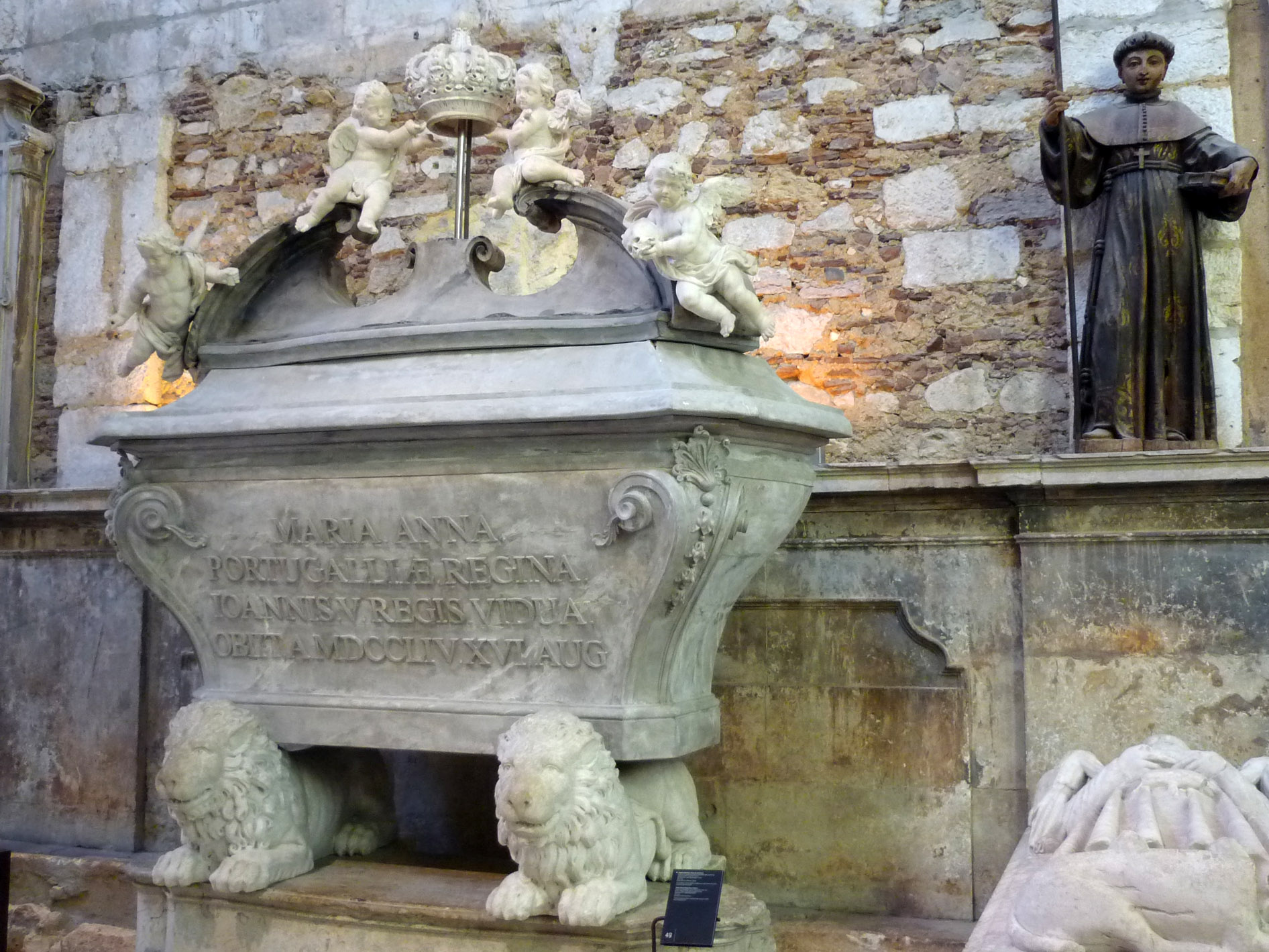 Grabmal der Maria Anna von Österreich (1683-1754), Königin von Portugal, im ehem. Karmeliter-Konvent (Convento do Carmo) in Lissabon